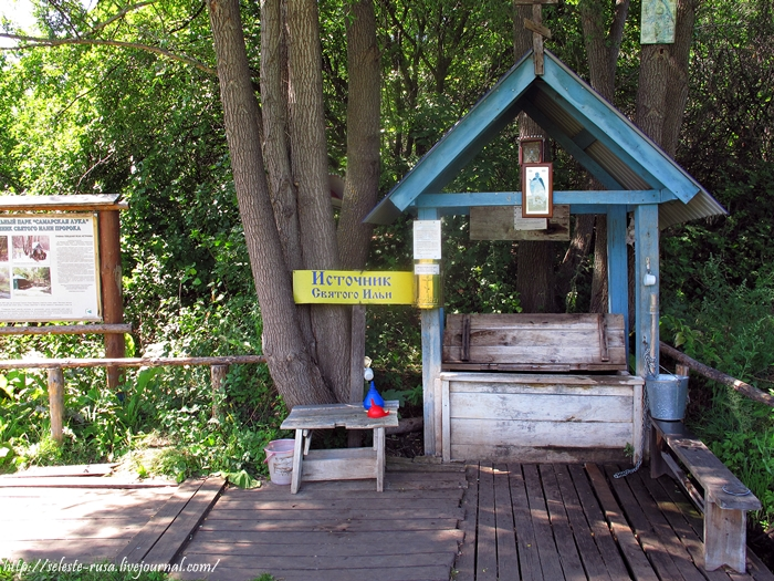 Святой источник пророка Илии. Заволжский монастырь в честь Честного и Животворящего Креста Господня